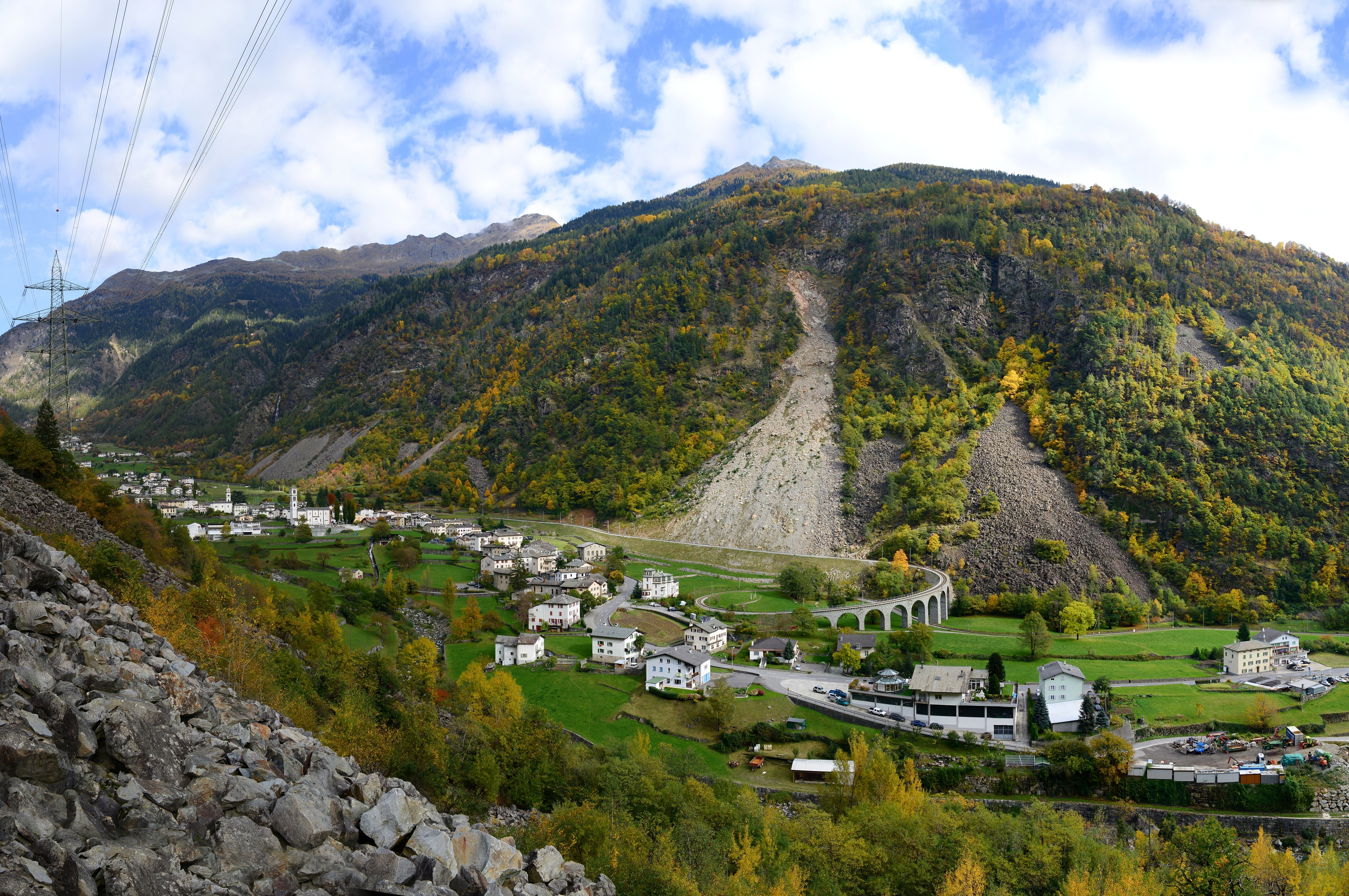 Das Ortsbild von Brusio prägen die barocken Türme der beiden Kirchen San Carlo Borromeo und die Reformierte Kirche Brusio als auch das bekannte Kreisviadukt der Rhätischen Bahn. Links oben: Reformierte Kirche mit Pfarrhaus This is an image of a cultural property of national significance in Switzerland with KGS number 2890 Rechts daneben: Katholische Kirche San Carlo Borromeo This is an image of a cultural property of national significance in Switzerland with KGS number 2889 Bildmitte: Casa Besta / Marlianico, Li Canvi 277 This is an image of a cultural property of national significance in Switzerland with KGS number 2888 Bildmitte: Gruppe der 9 «Crot»